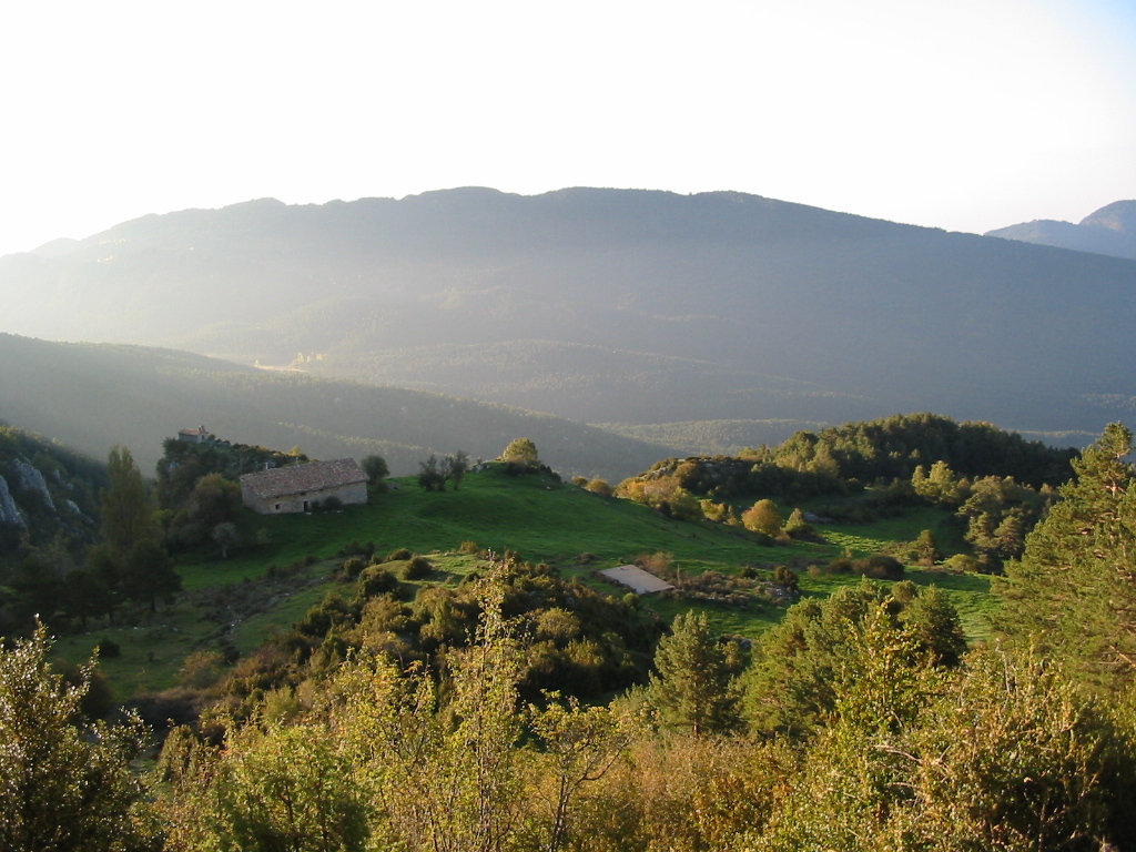 Rasos de Peguera en Berga, Catalunya.